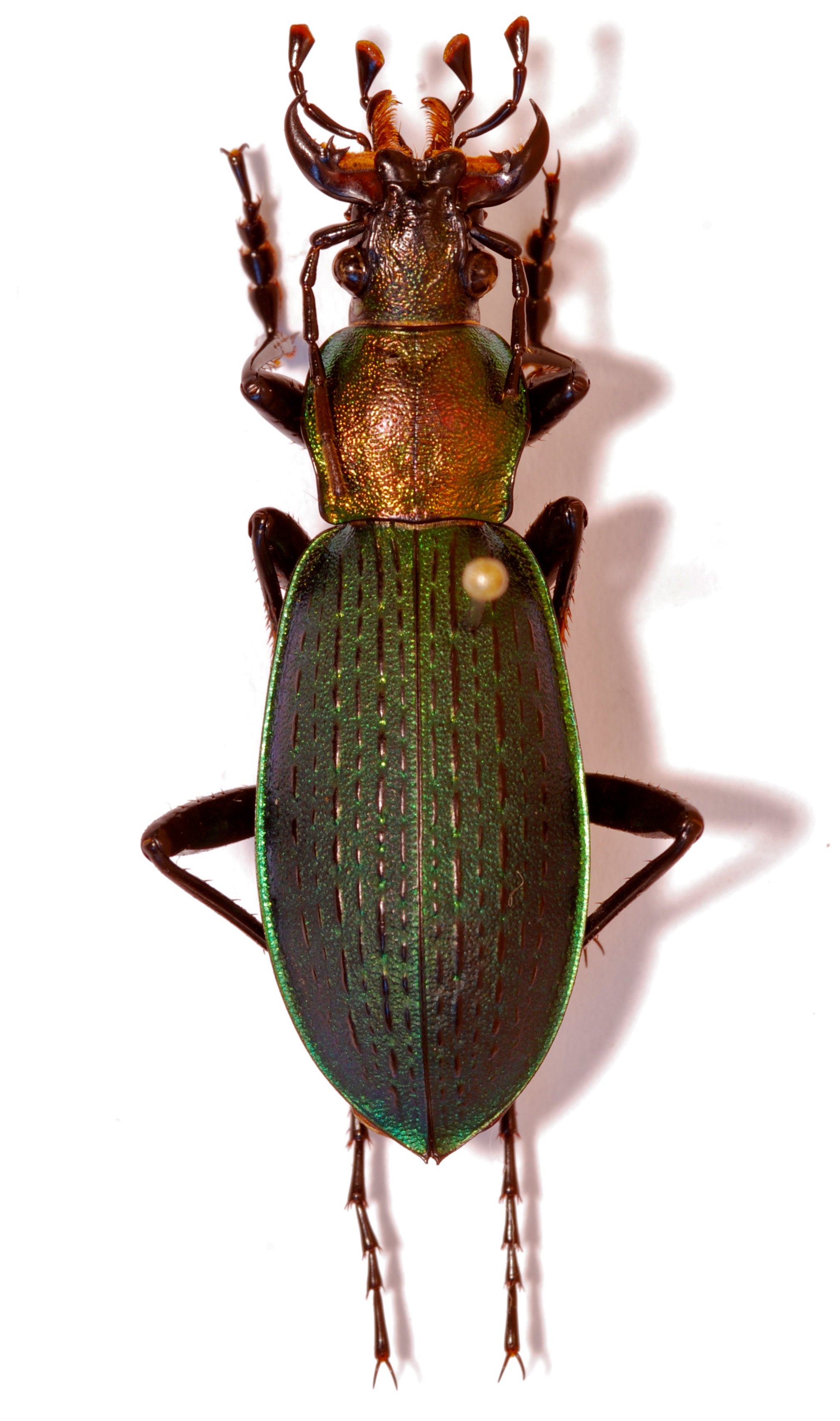 Mt Chonmasan, NORTH KOREA